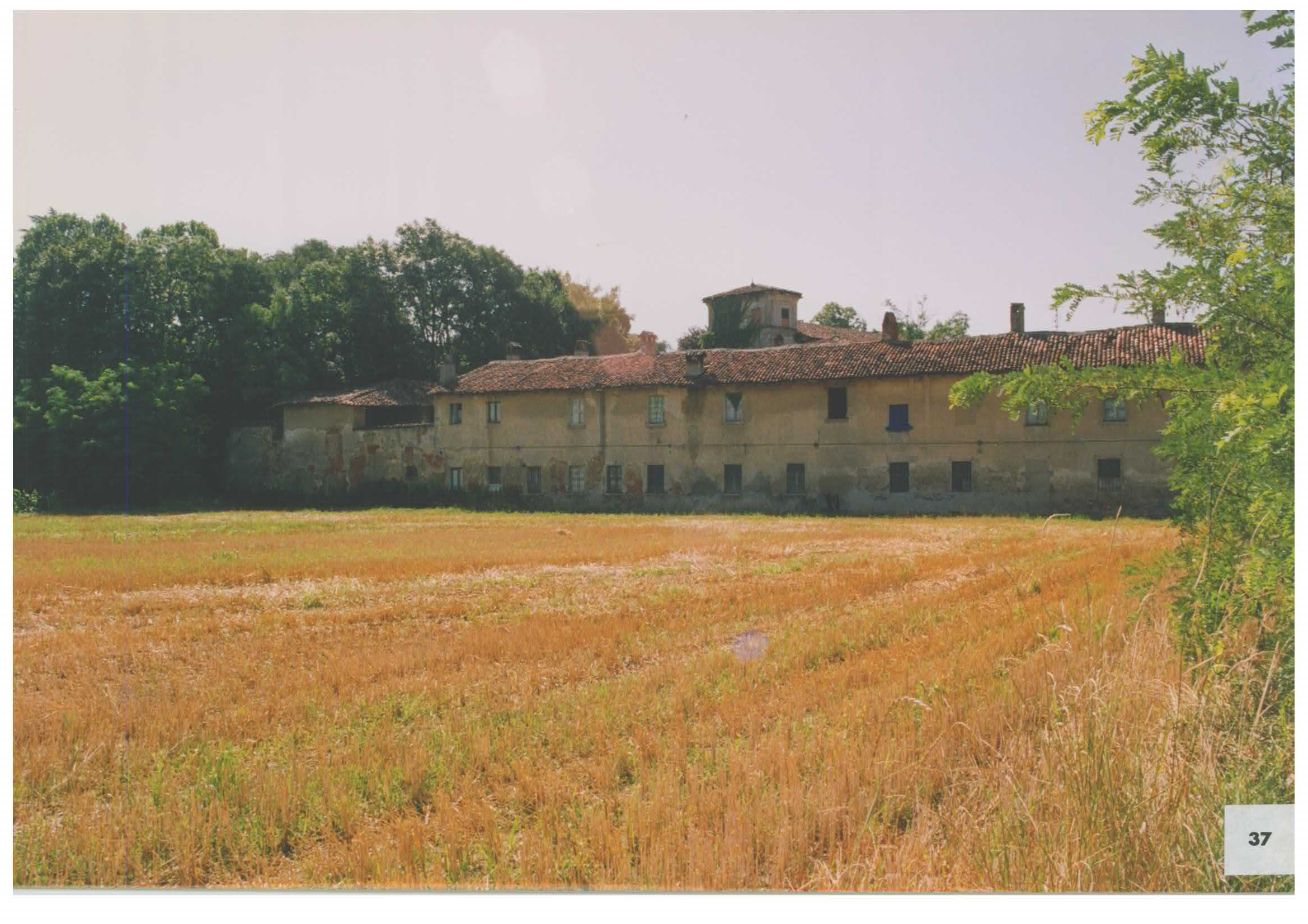 Baraggia nel 1994